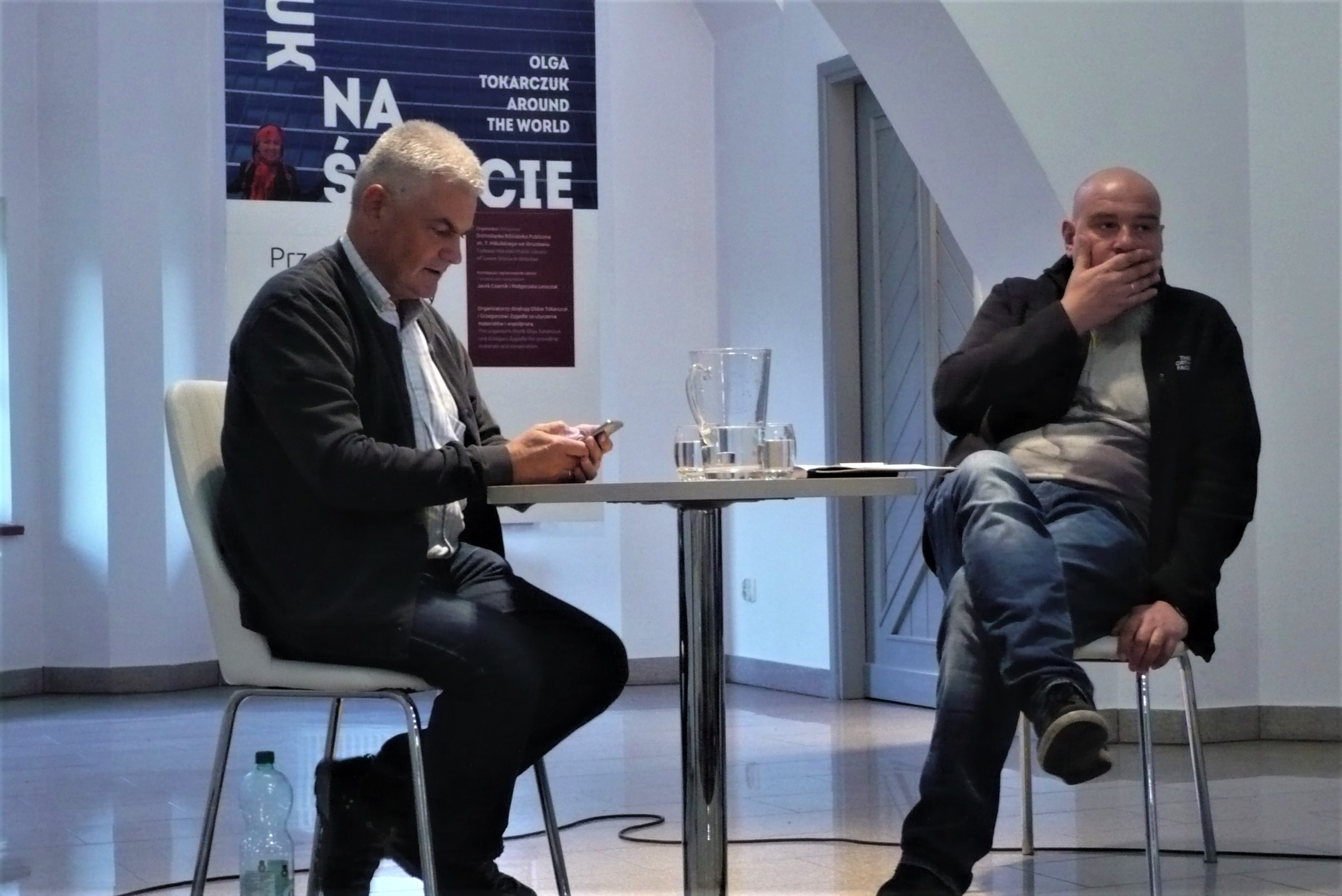 Edwin Bendyk i Ireneusz Grin.